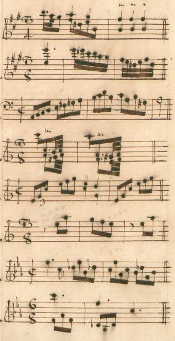 Table du volume X des manuscrits de Parme (incipit des sonates 23 à 30, K. 380-387).